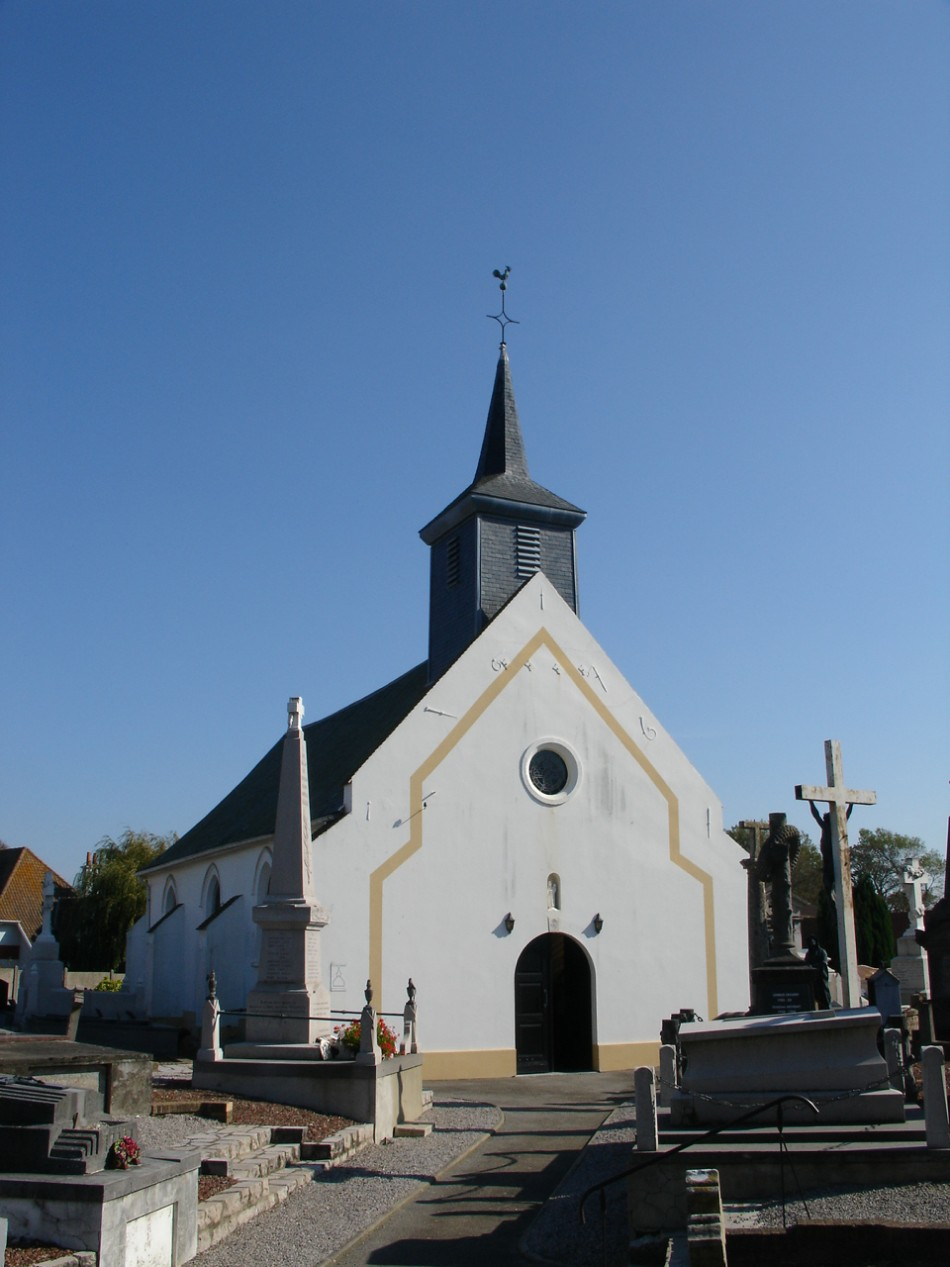 Église de Peuplingues